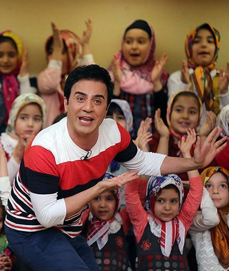 داریوش فرضیایی در حال اجرای برنامهٔ تلویزیونی «کتابخانهٔ عمو پورنگ»(اسفند ۱۳۹۲)ا